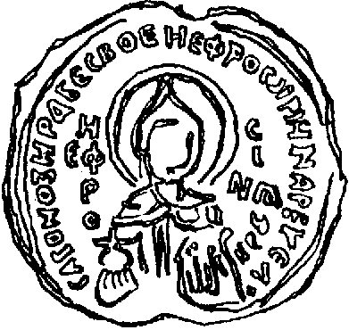 Пячатка Ефрасінні Полацкай